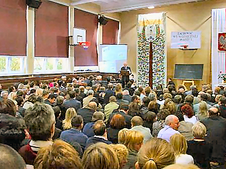 Zdjecie z uroczystości szkolnej (50-lat XLVIII Liceum Ogólnokształcącego im. Edwarda Dembowskiego w Warszawie).